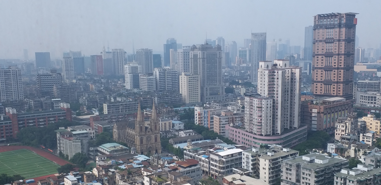 自广州民间金融大厦俯拍